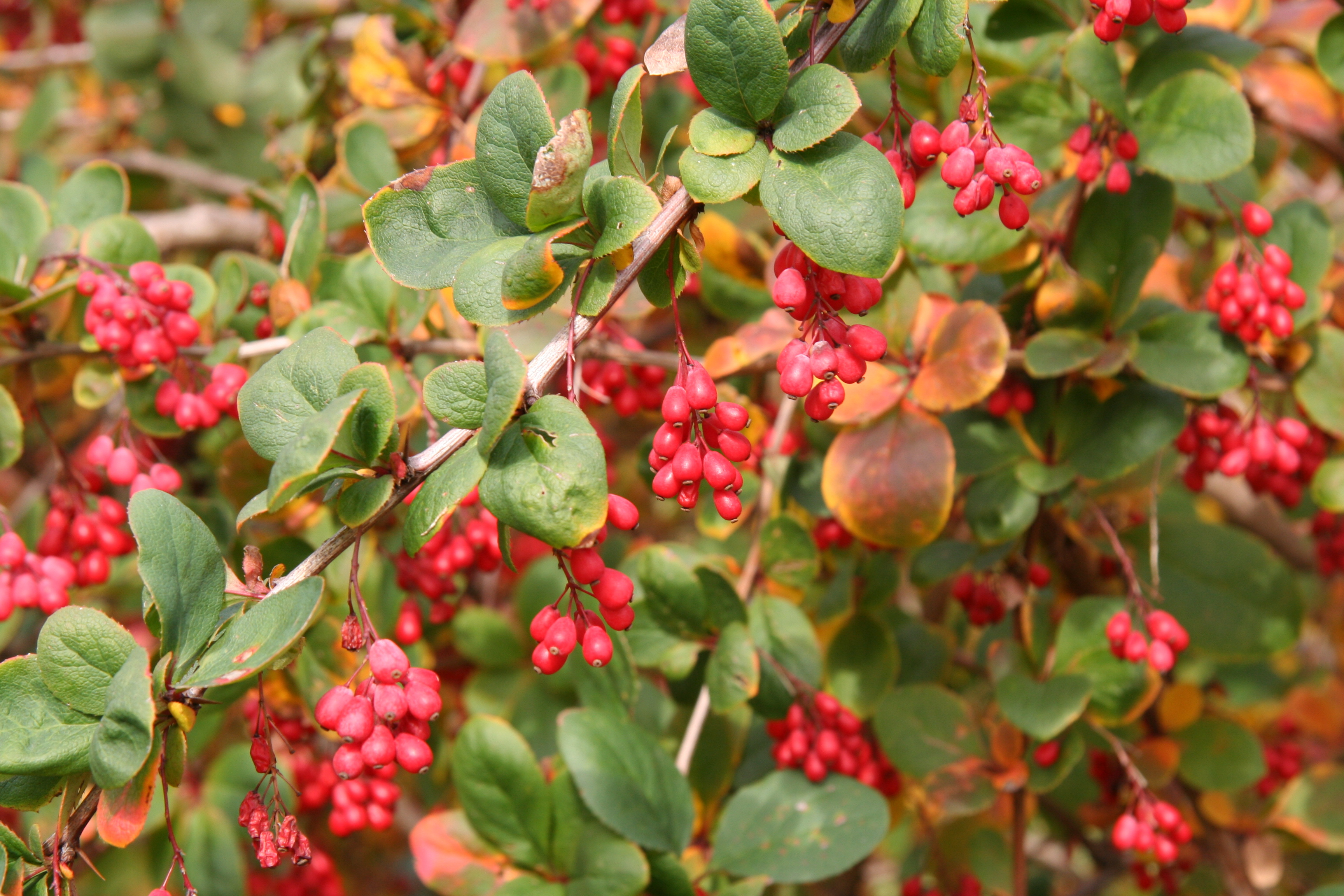 Früchte an Berberis koreana im Botanischen Garten Dresden